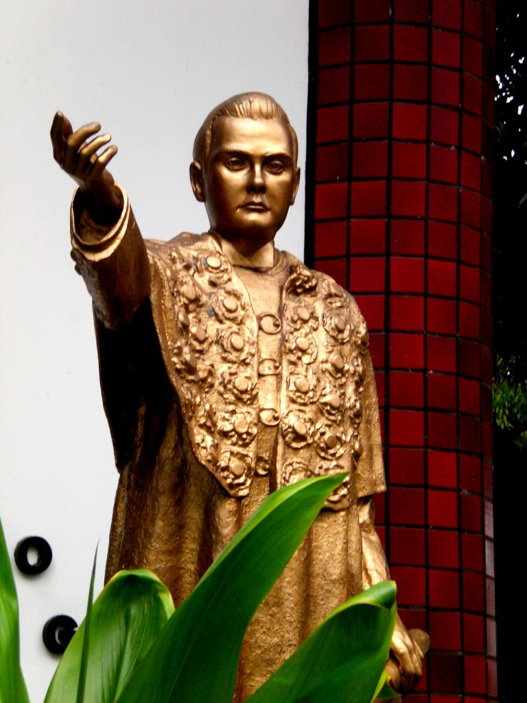 Estátua em frente a Fundação Orlando Gomes, na Faculdade de Direito da UFBa, rua da Paz, Graça - Salvador, Bahia.